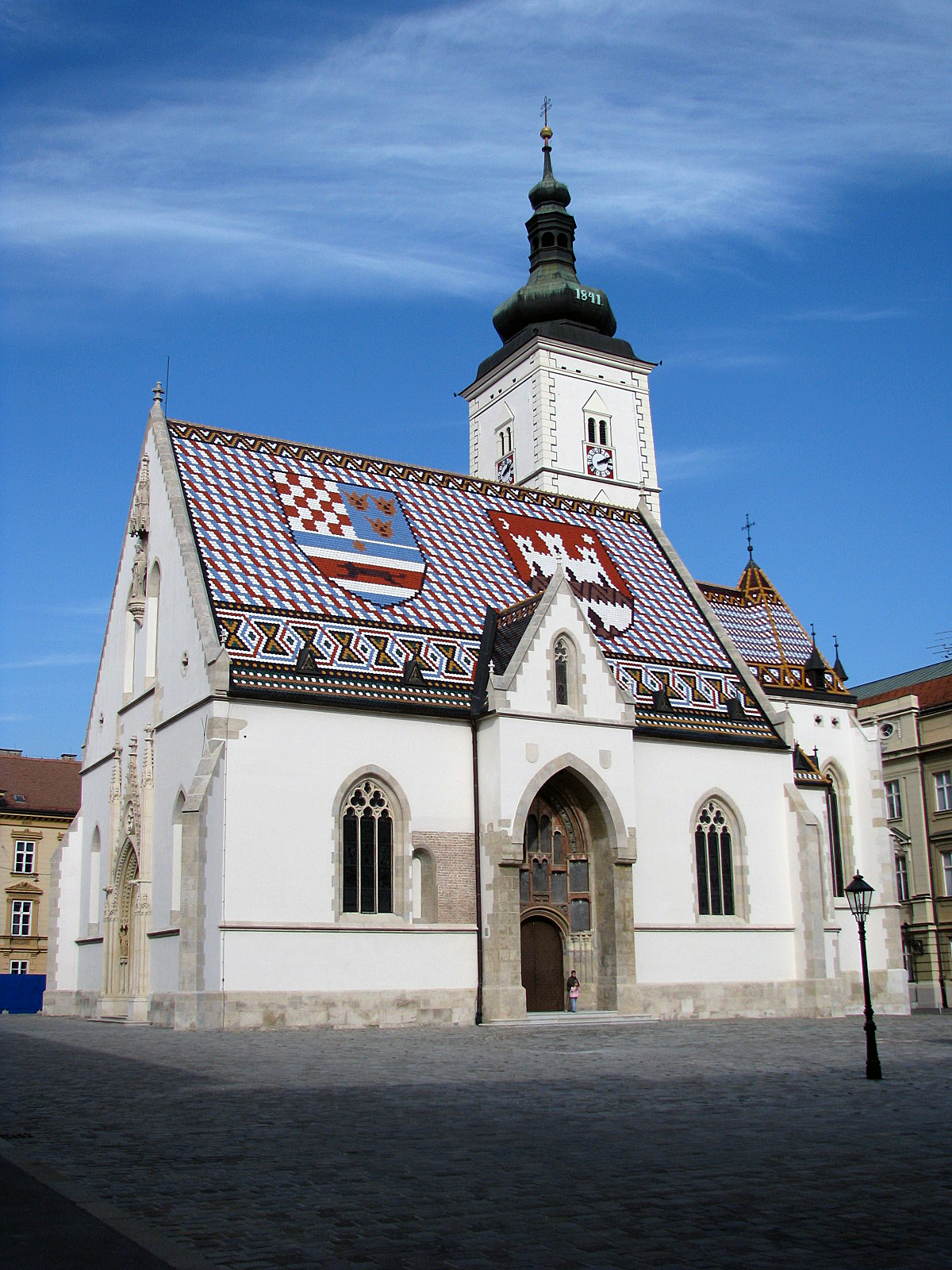 St. Marco church, Upper Town, Zagreb (Crkva sv. Marka u Zagrebu na gornjem gradu)